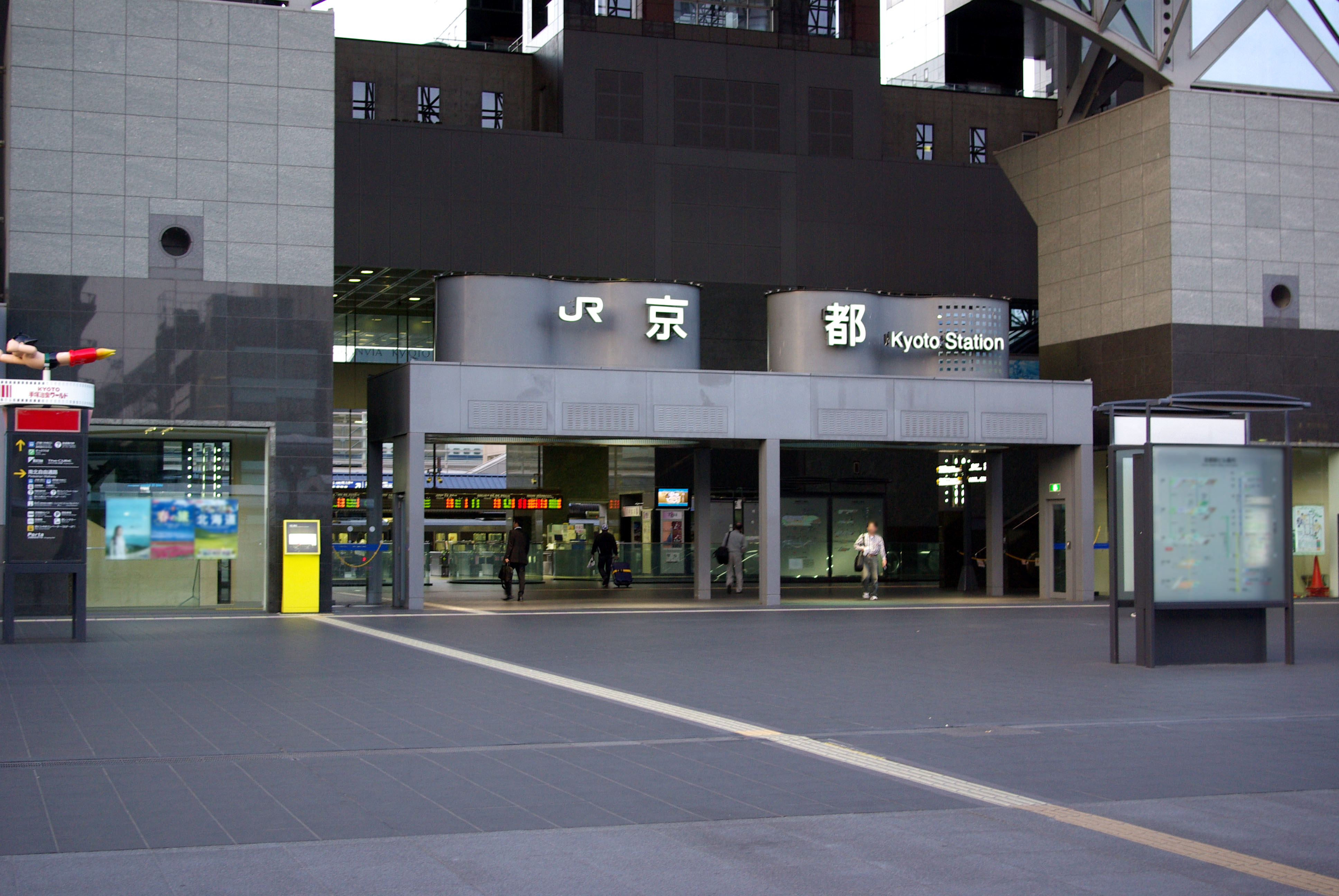 西日本旅客鉄道東海道本線他京都駅